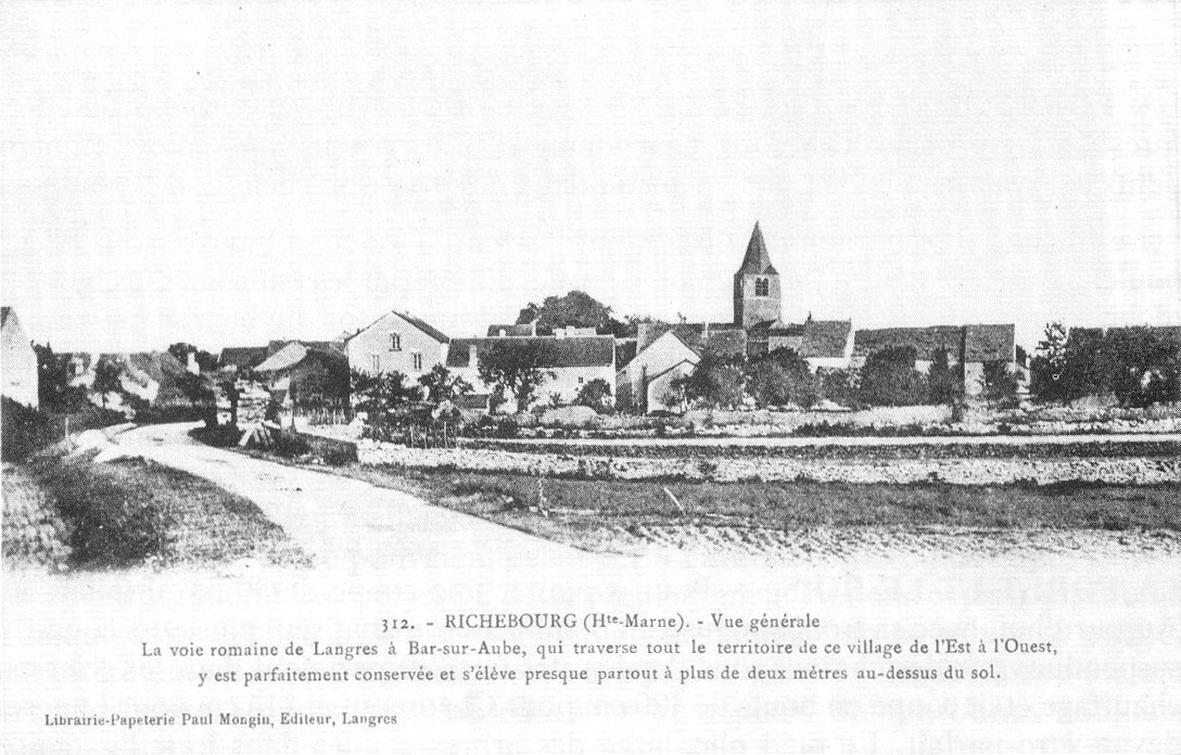 Carte postale ancienne Vue générale de Richebourg, Haute-Marne, France